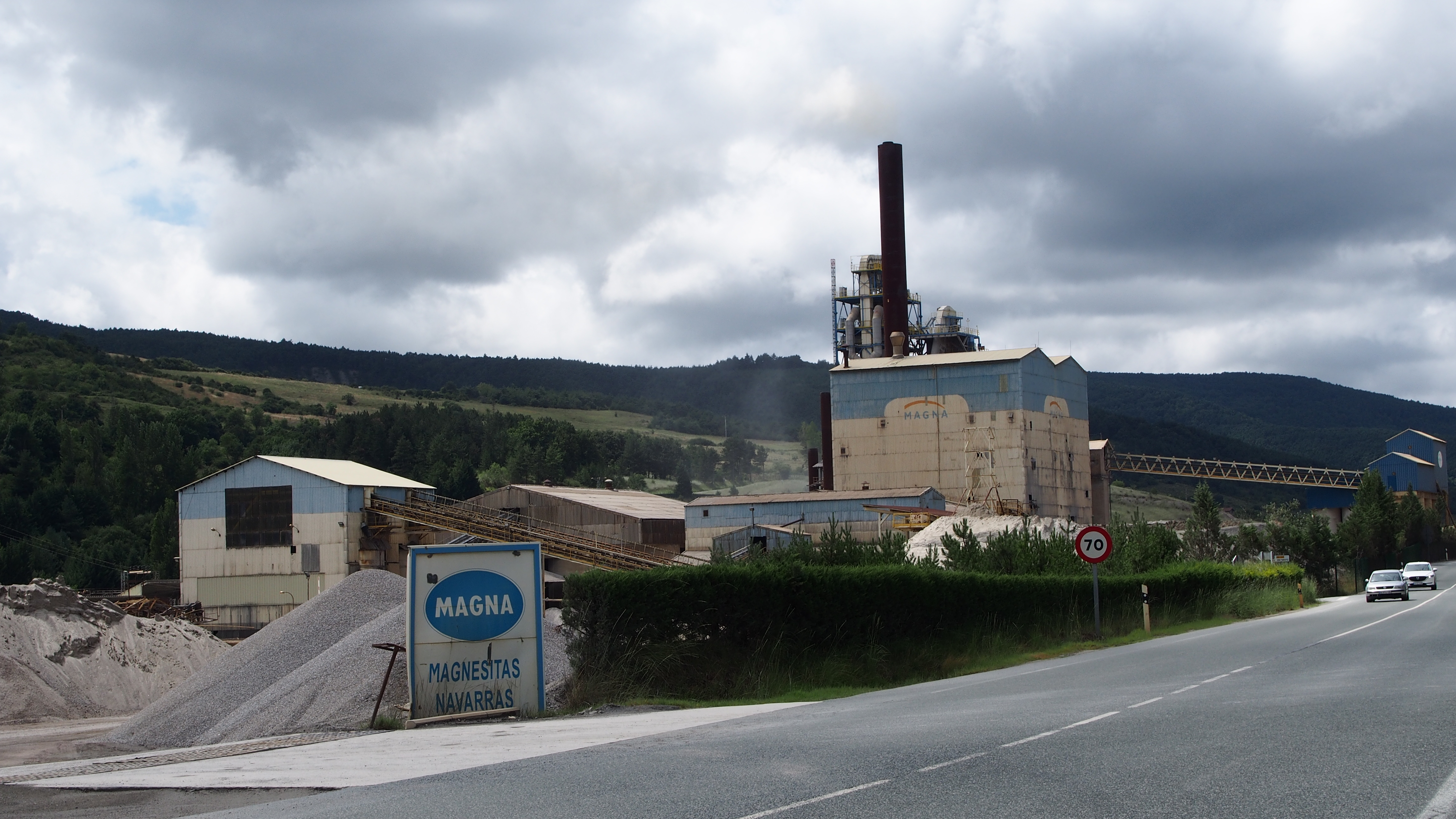 MAGNA enpresaren ustiaketa eta eraldaketa planta errepidetik ikusia. Zubiri, Esteribar, Nafarroa Garaia.